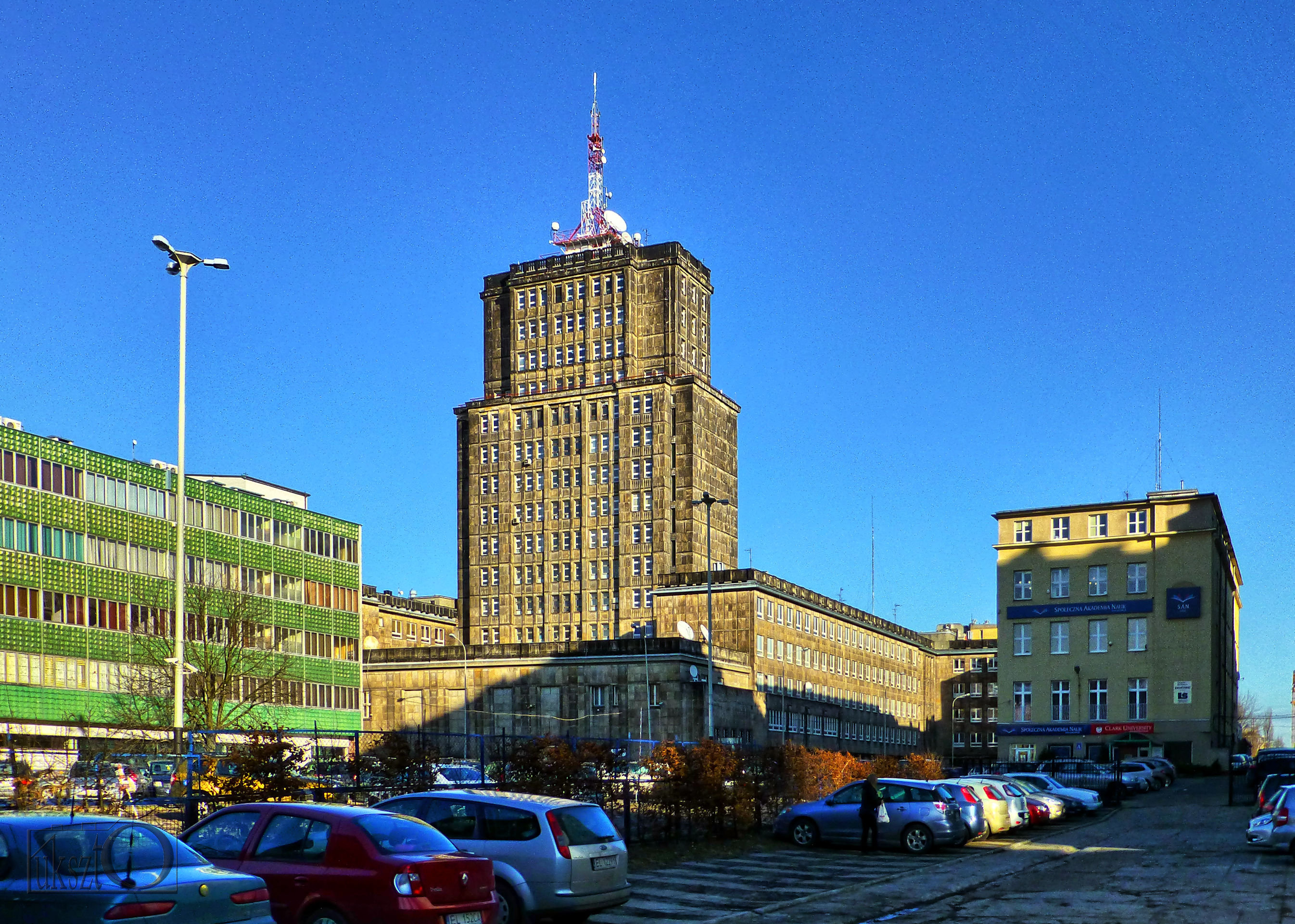 Łódź, ul. Narutowicza Gabriela 13, Wieżowiec Telewizji Polskiej